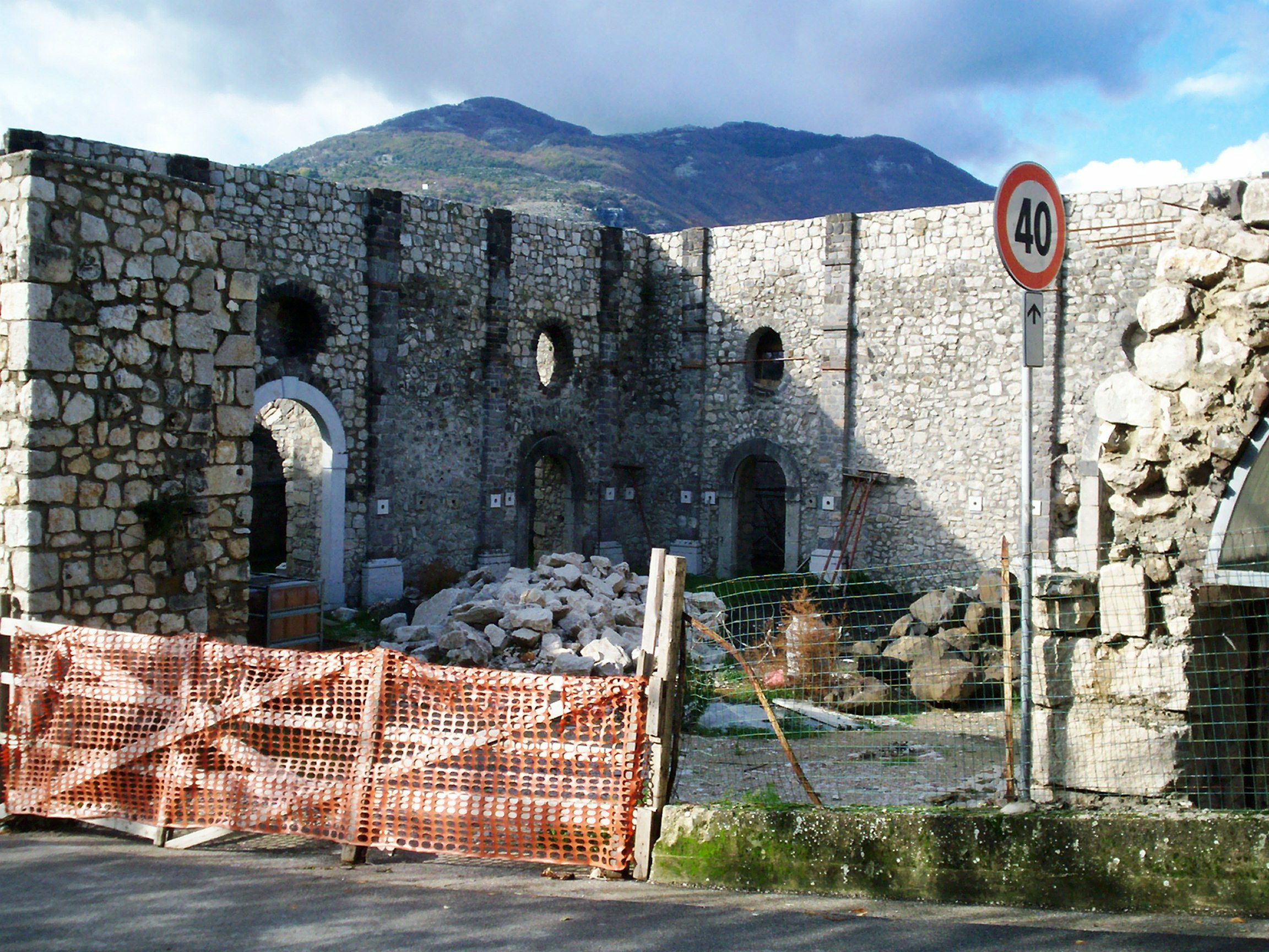 Particolare dei resti dell'ex Tintoria ducale dei panni lana in Cerreto Sannita (Bn)